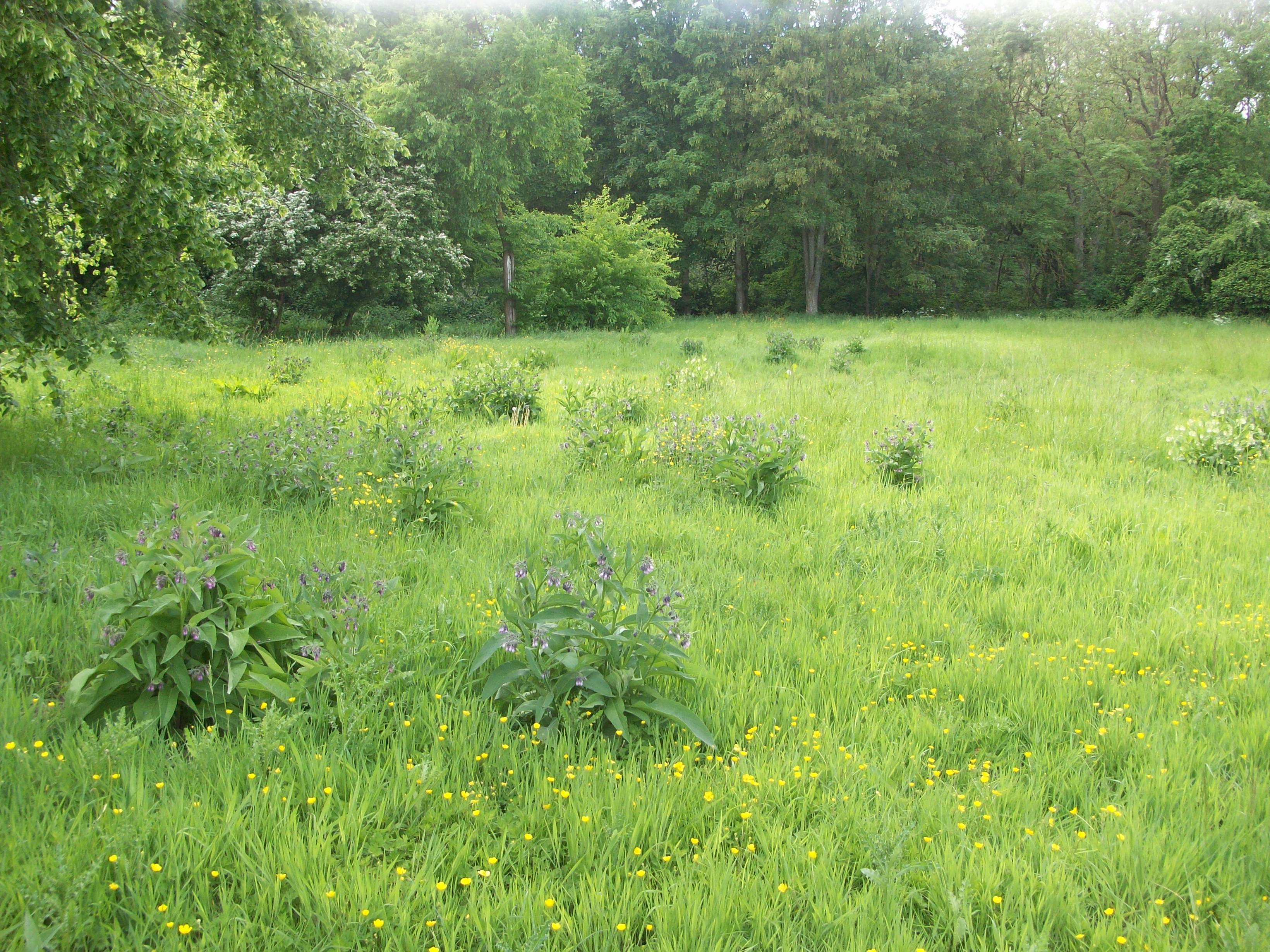 Consoudes de couleurs variées dans une prairie de Bergue 59380